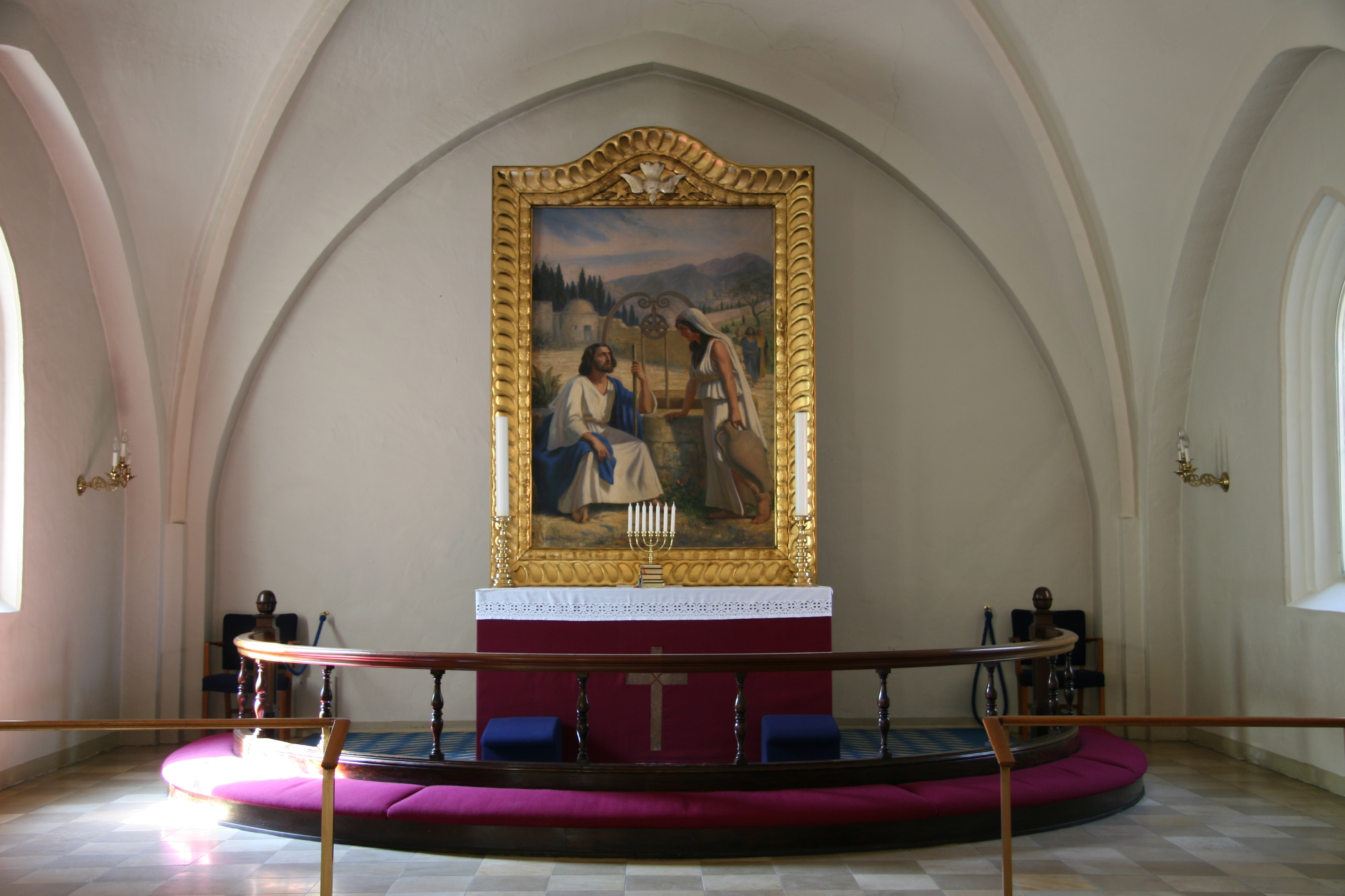 Kildevældskirken in Copenhagen, Denmark. Altar.